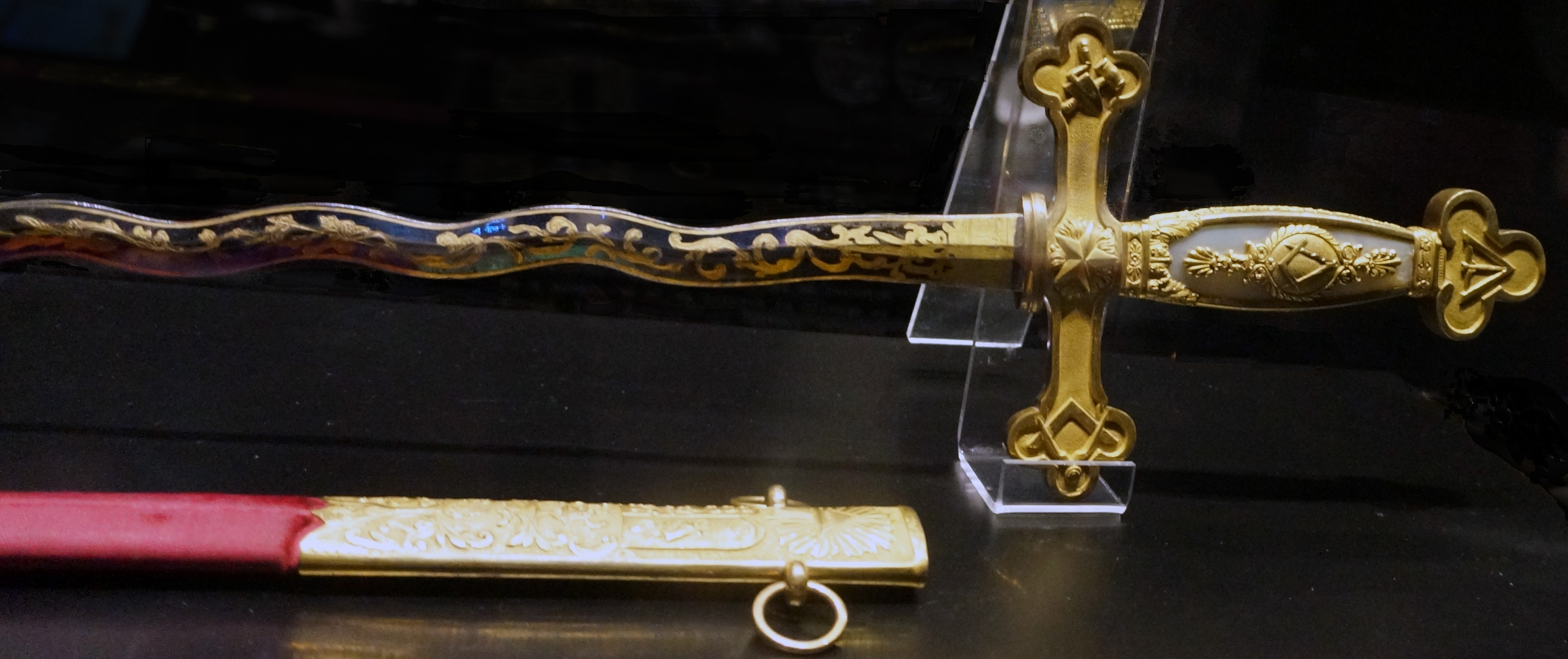 Collection du Musée de la Franc-Maçonnerie.